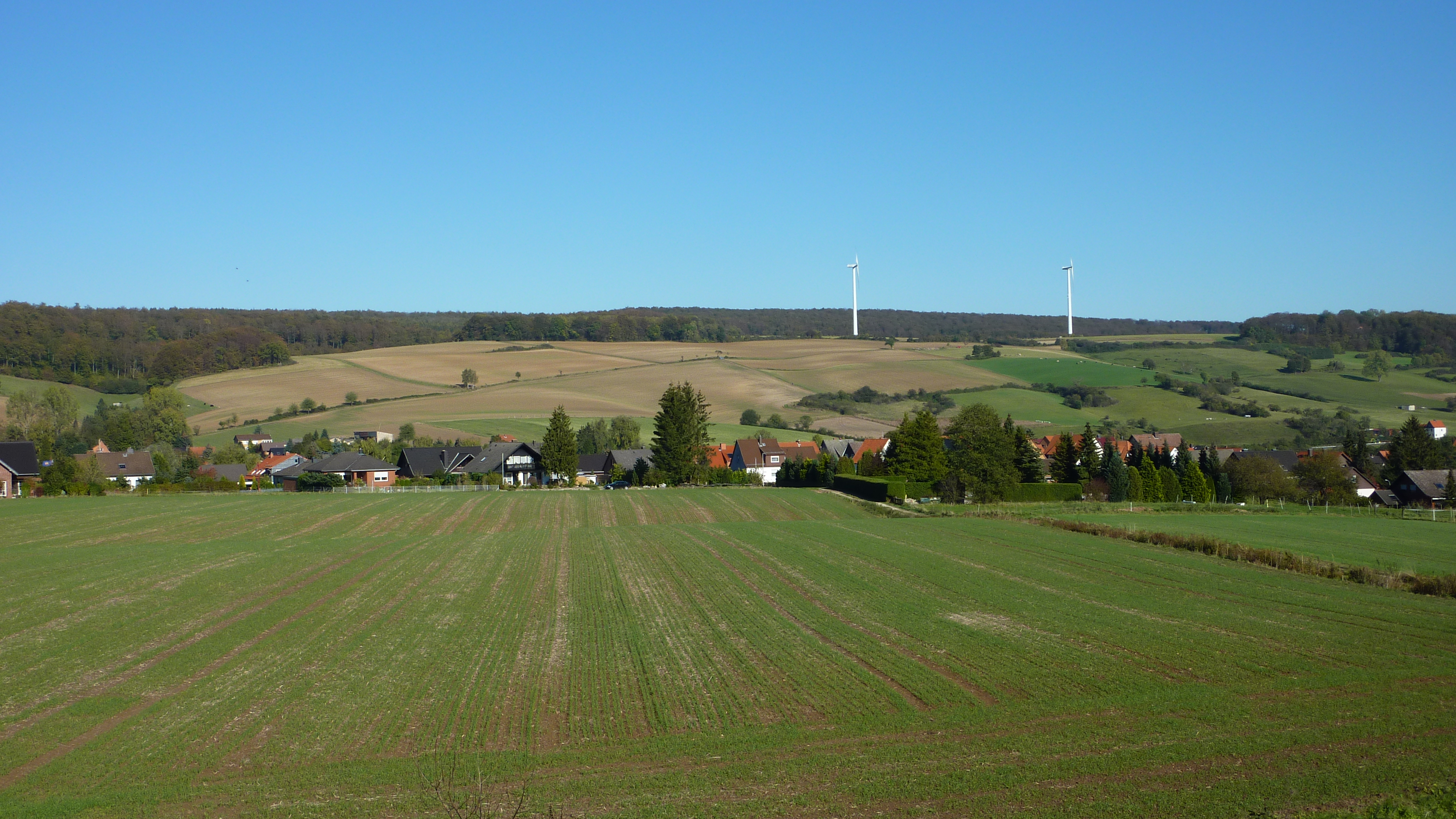 Coppengrave Panorama